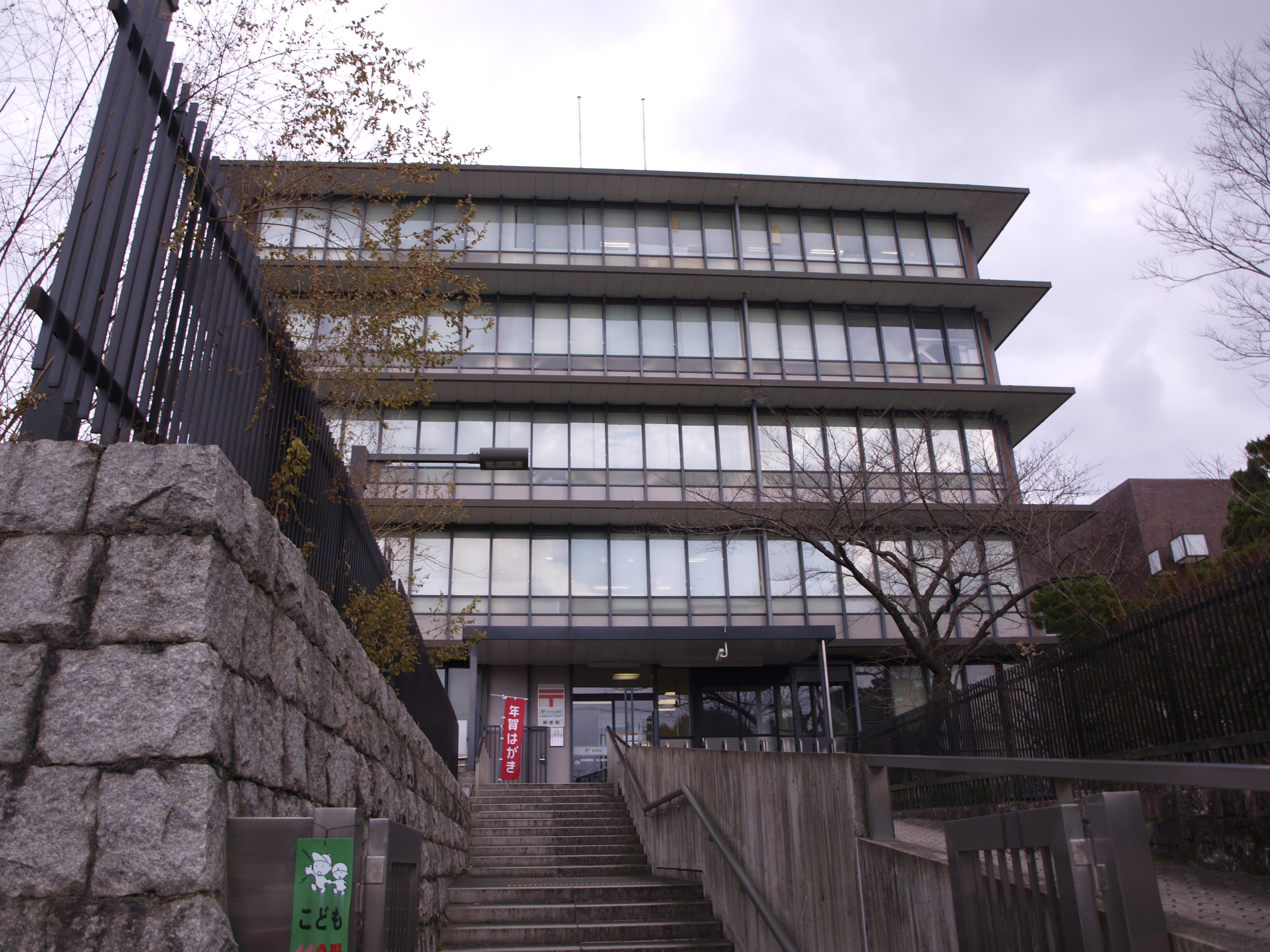 ２０１３年３月１６日に廃止になった西陣郵便局松ヶ崎分室